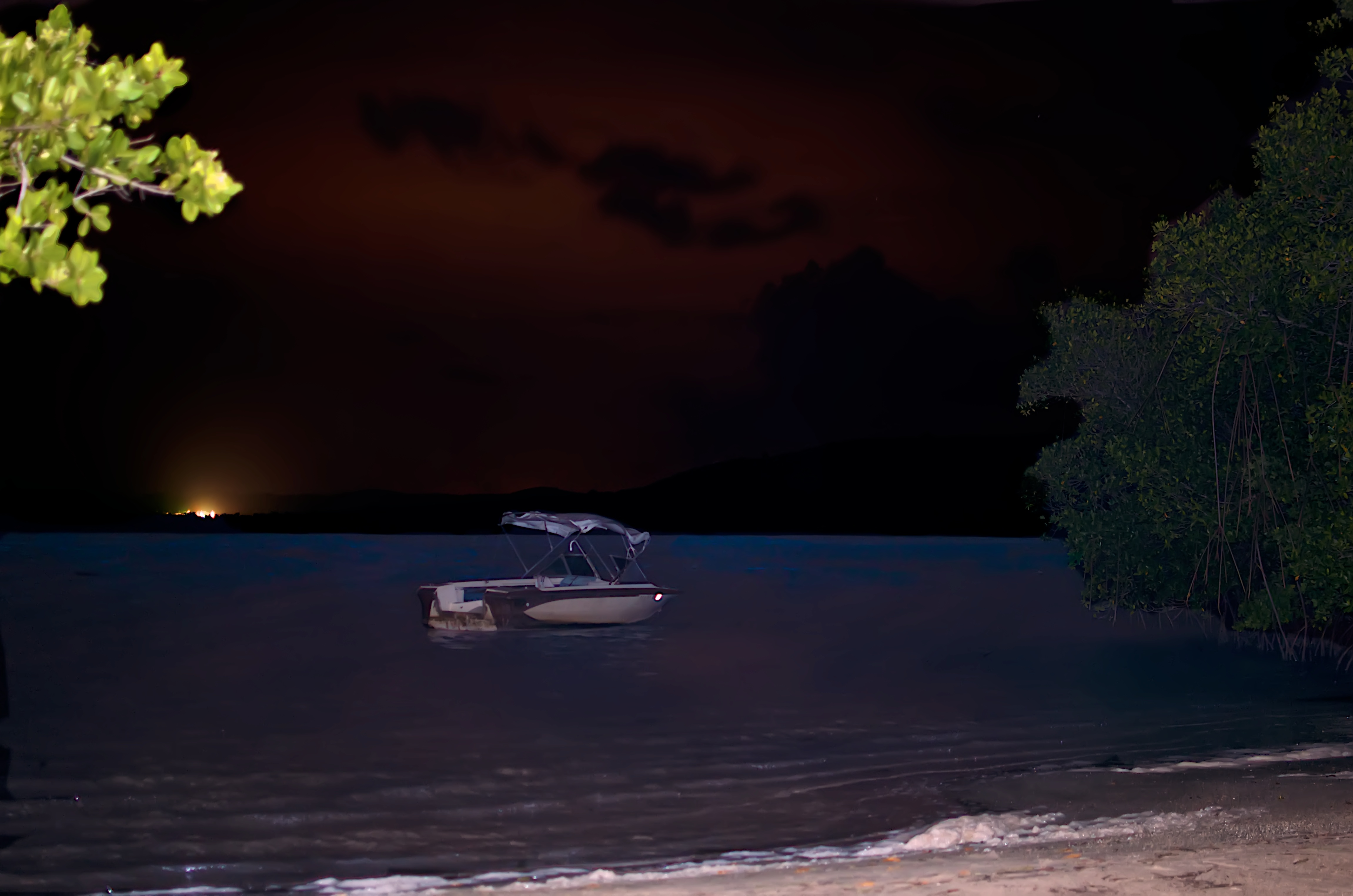 Puerto Ferro Peninsula Rd, Vieques, 00765, Puerto Rico